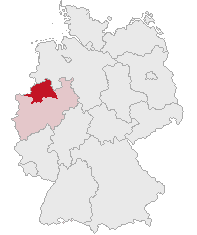 Regierungsbezirk Münster, North Rhine-Westphalia, Germany